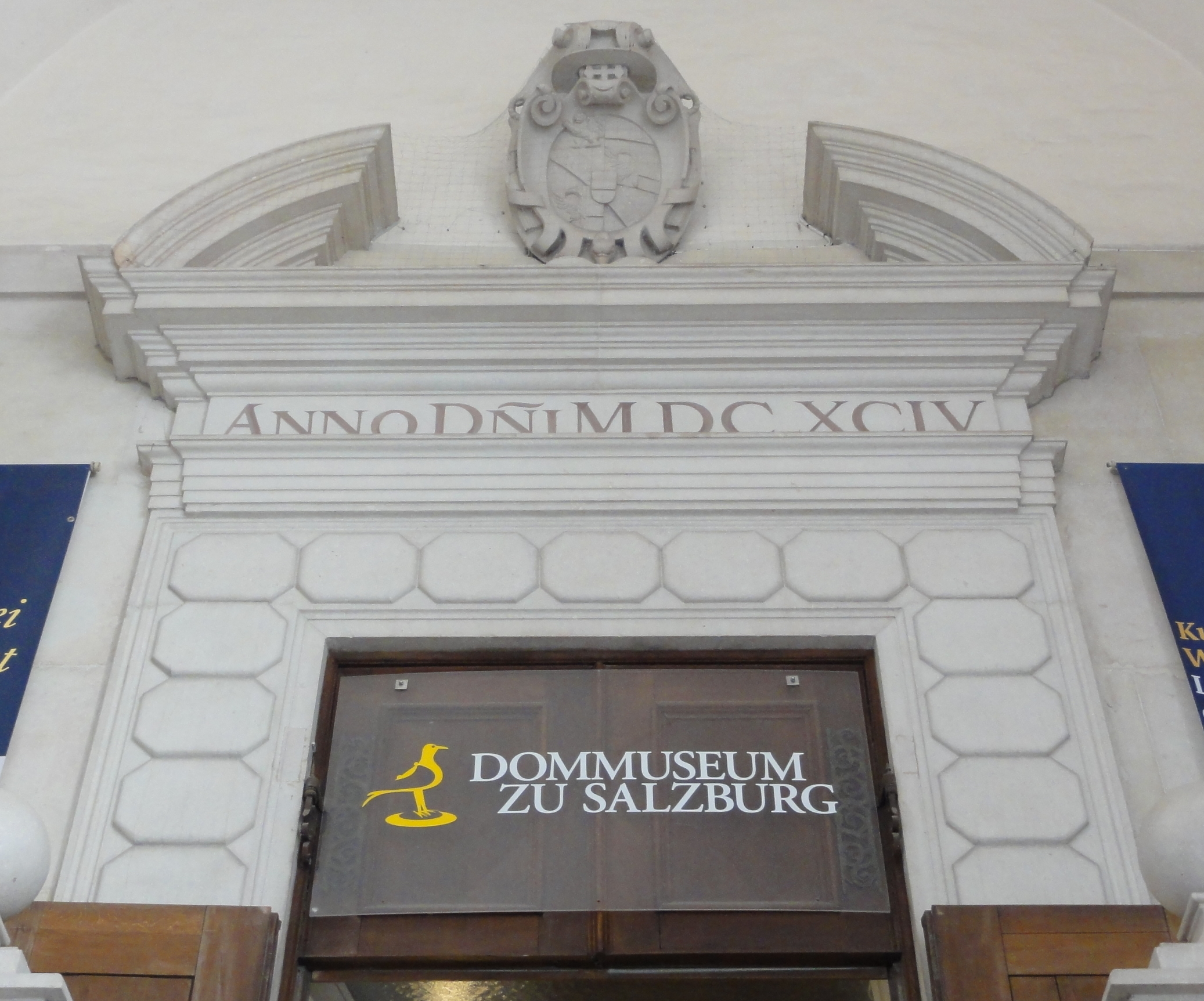 Austria, Bundesland Salzburg, Salzburg